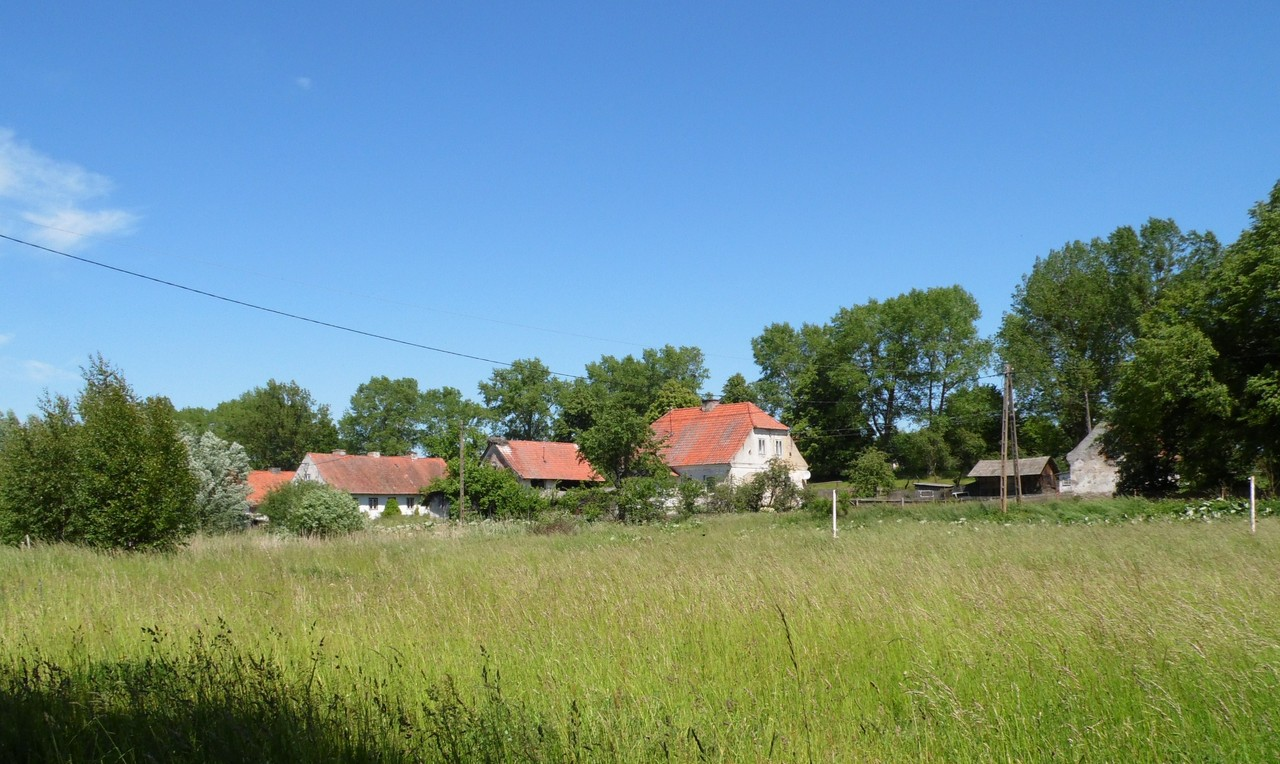 Panorama wsi Bajory Wlk.